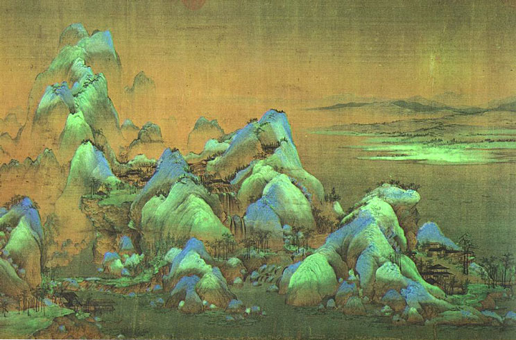 [宋] 王希孟 千里江山图（细节） 横轴绢本设色 纵51.5厘米 横1191.5厘米 现藏北京故宫博物院 来自